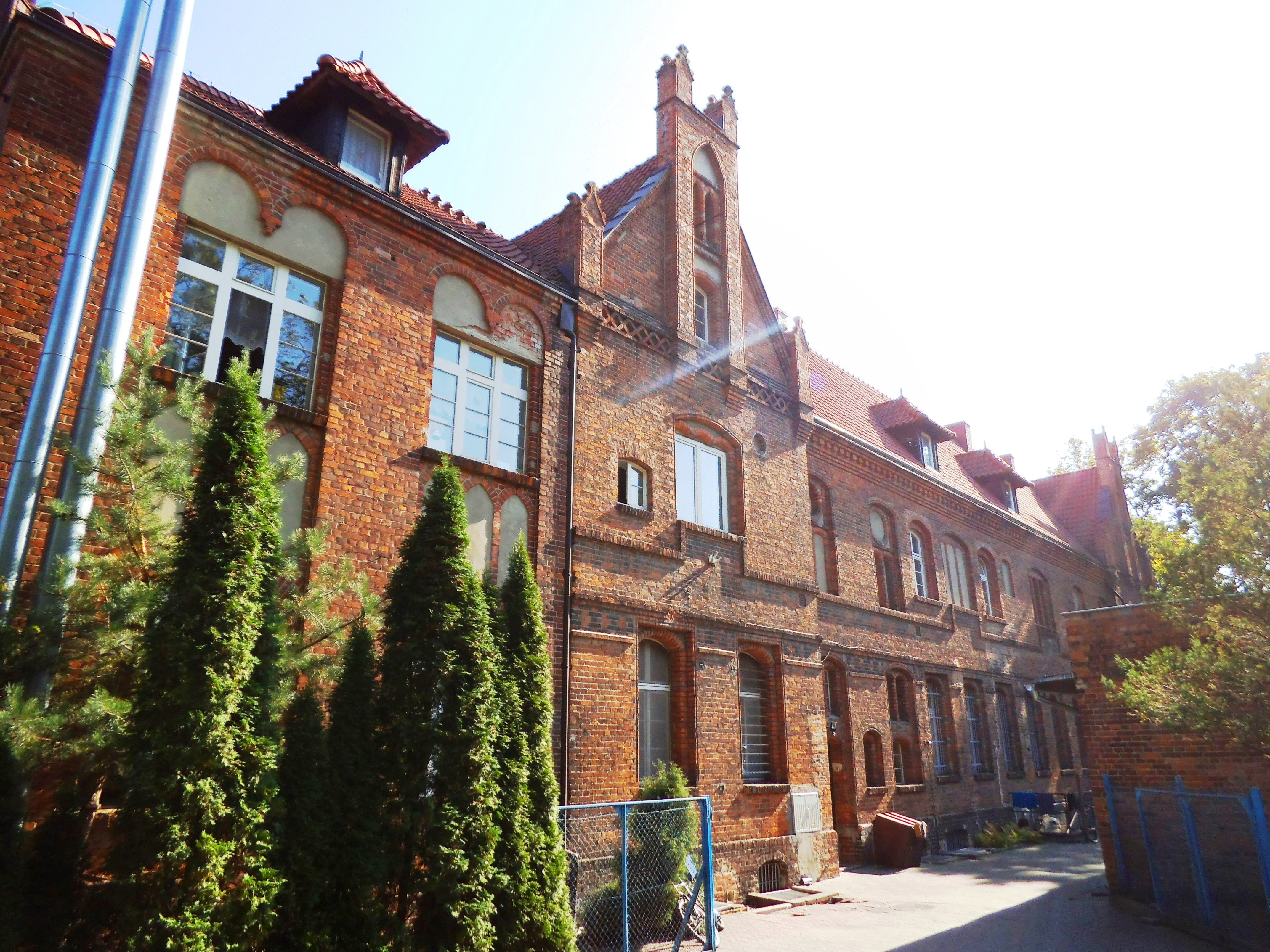 Budynek Toruńskiego Centrum Caritasu